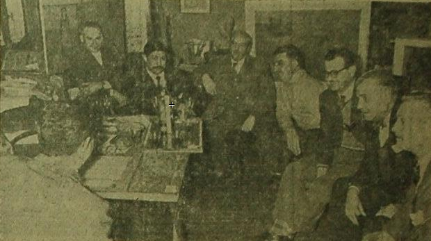 Reunión de los integrantes del grupo Setúbal con el diario El Litoral, donde exponen sus ideas.